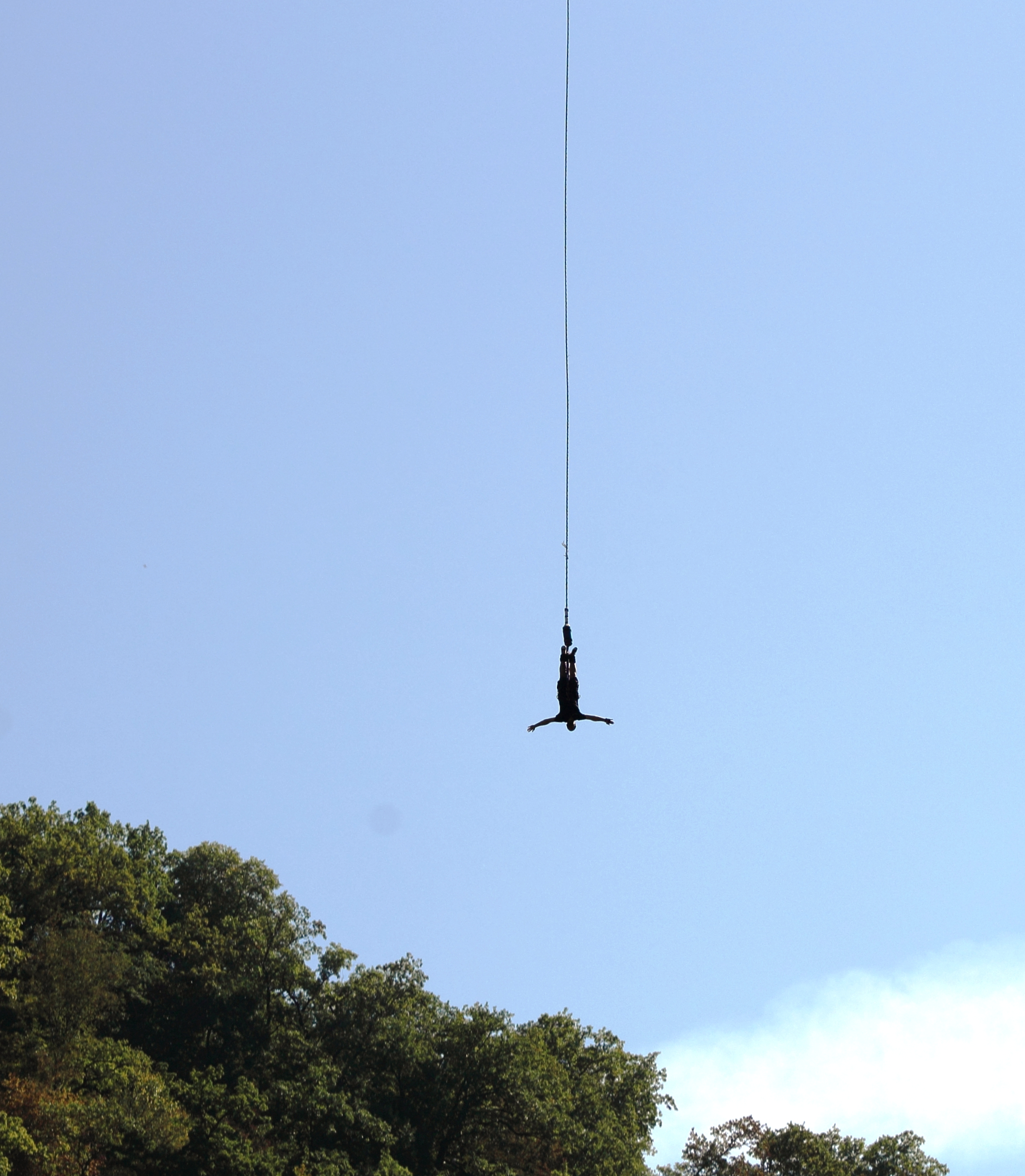 Банджи-джампинг на глубину 207 м в Сочи